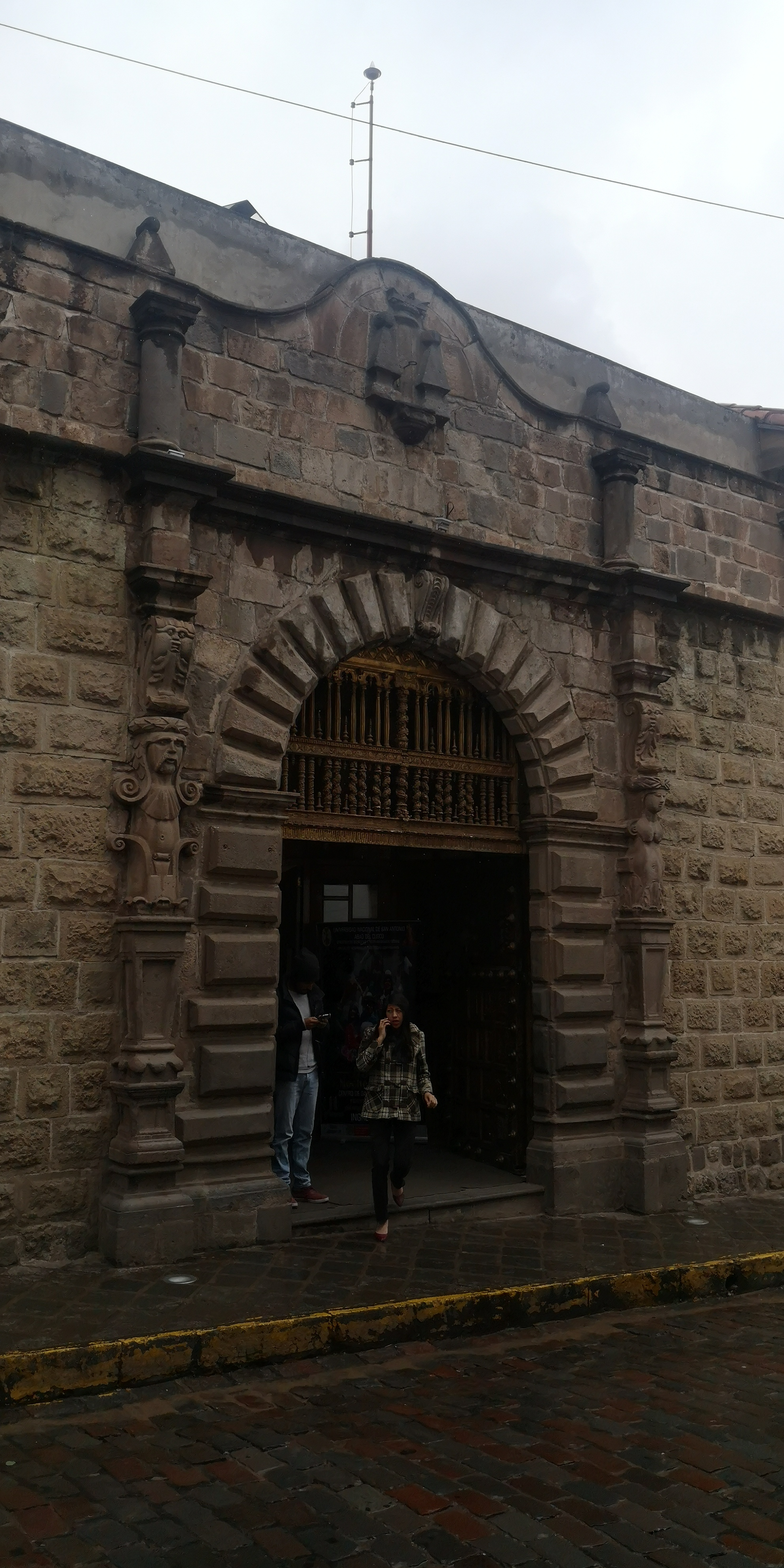 Puerta del antiguo Cine Colón, hoy Teatro Municipal del Cusco, en la ciudad de Cusco, Perú